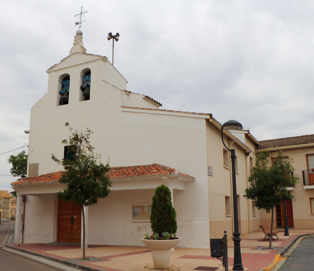 Iglesia de Nuestra Señora del Rosario. Iglesia, n. 13. Montañana